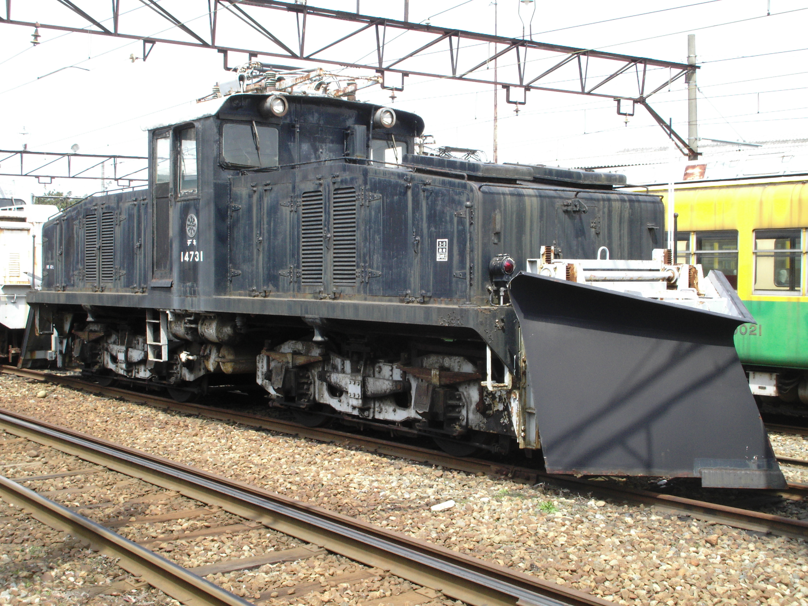 富山地方鉄道デキ14730形電気機関車 (built in 1947)